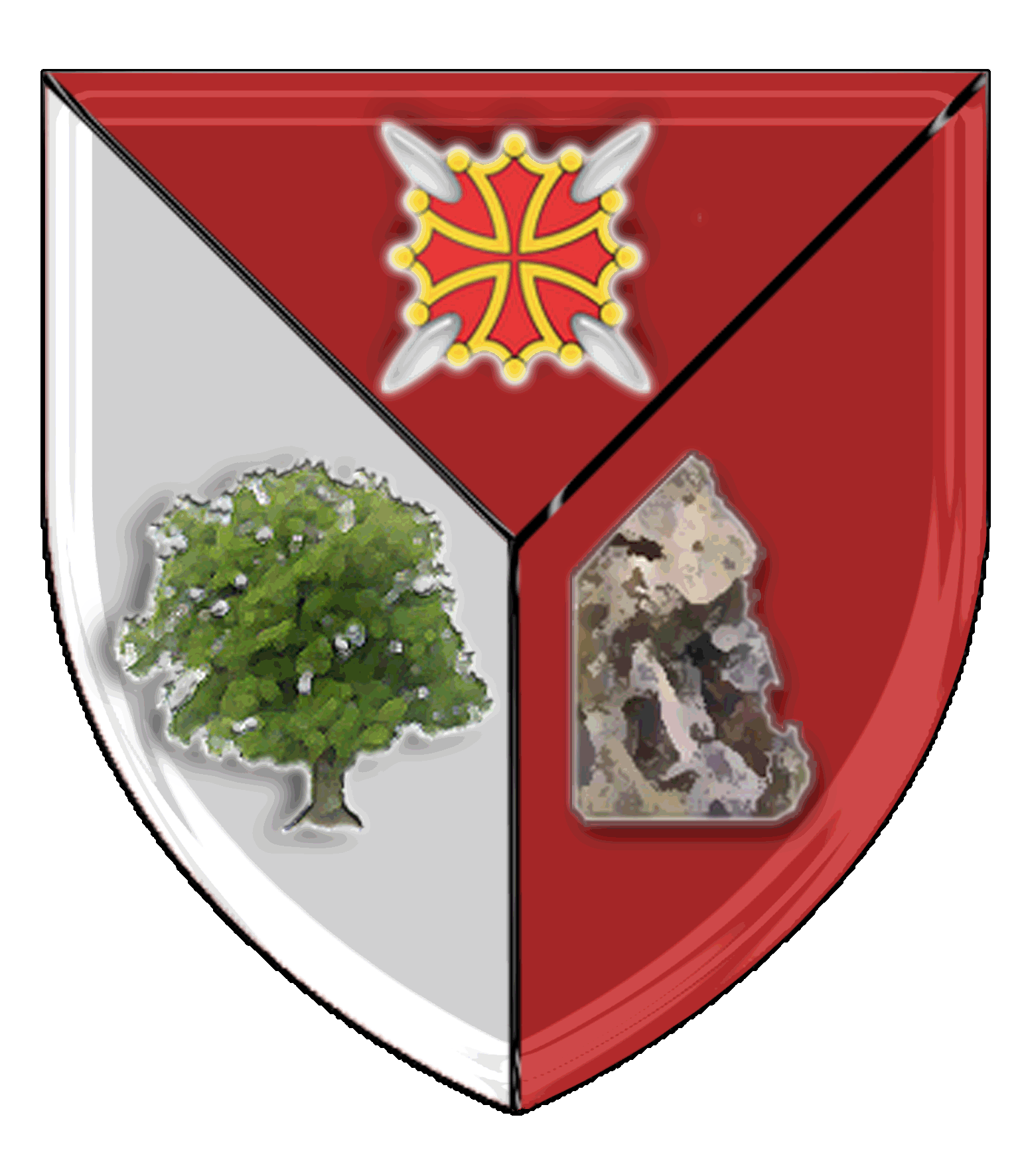 Blason-Commune de Bois de la Pierre